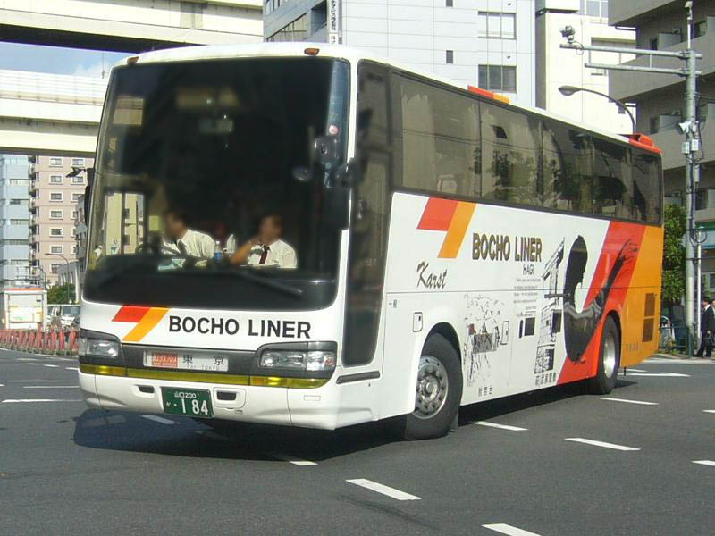 登録番号 山口200か・184 防長交通萩営業所所属 夜行用車両 （各系統で共通運用） 2007年8月14日 木場五丁目交差点にて撮影 （回送運転中）